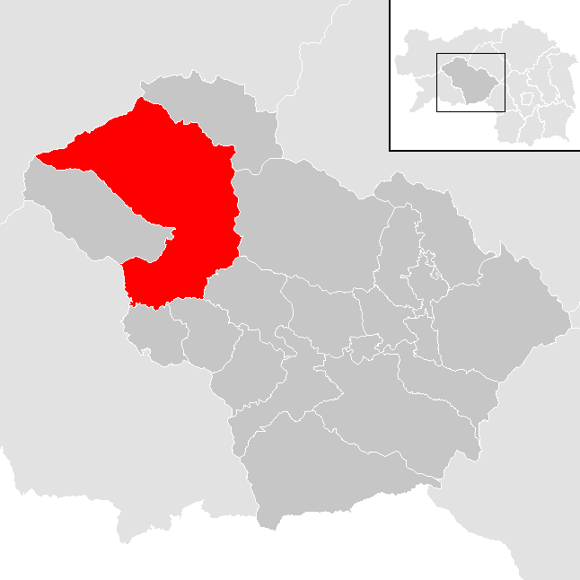 Lage von Pölstal im Bezirk Murtal